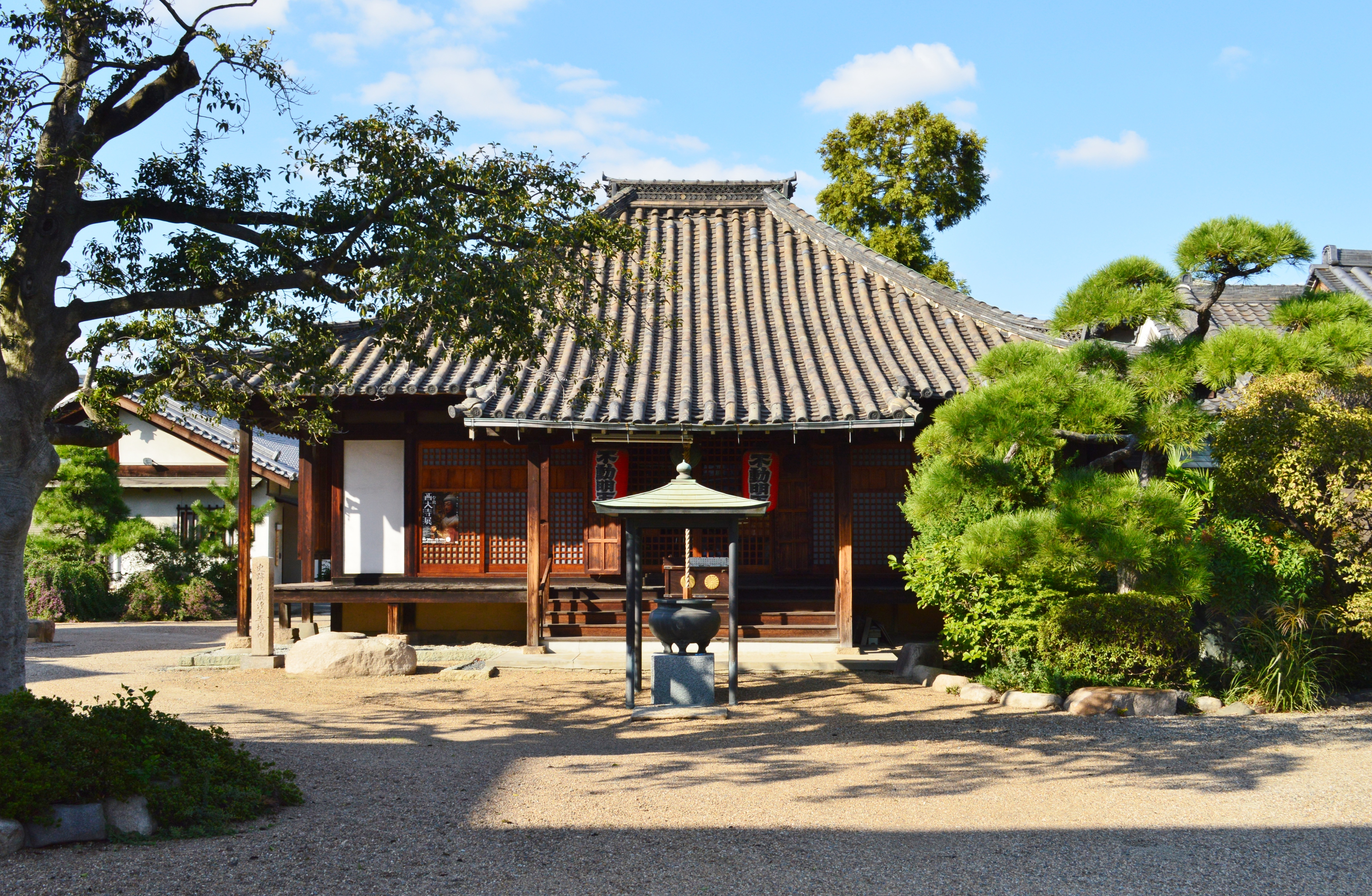 荘厳浄土寺 本堂